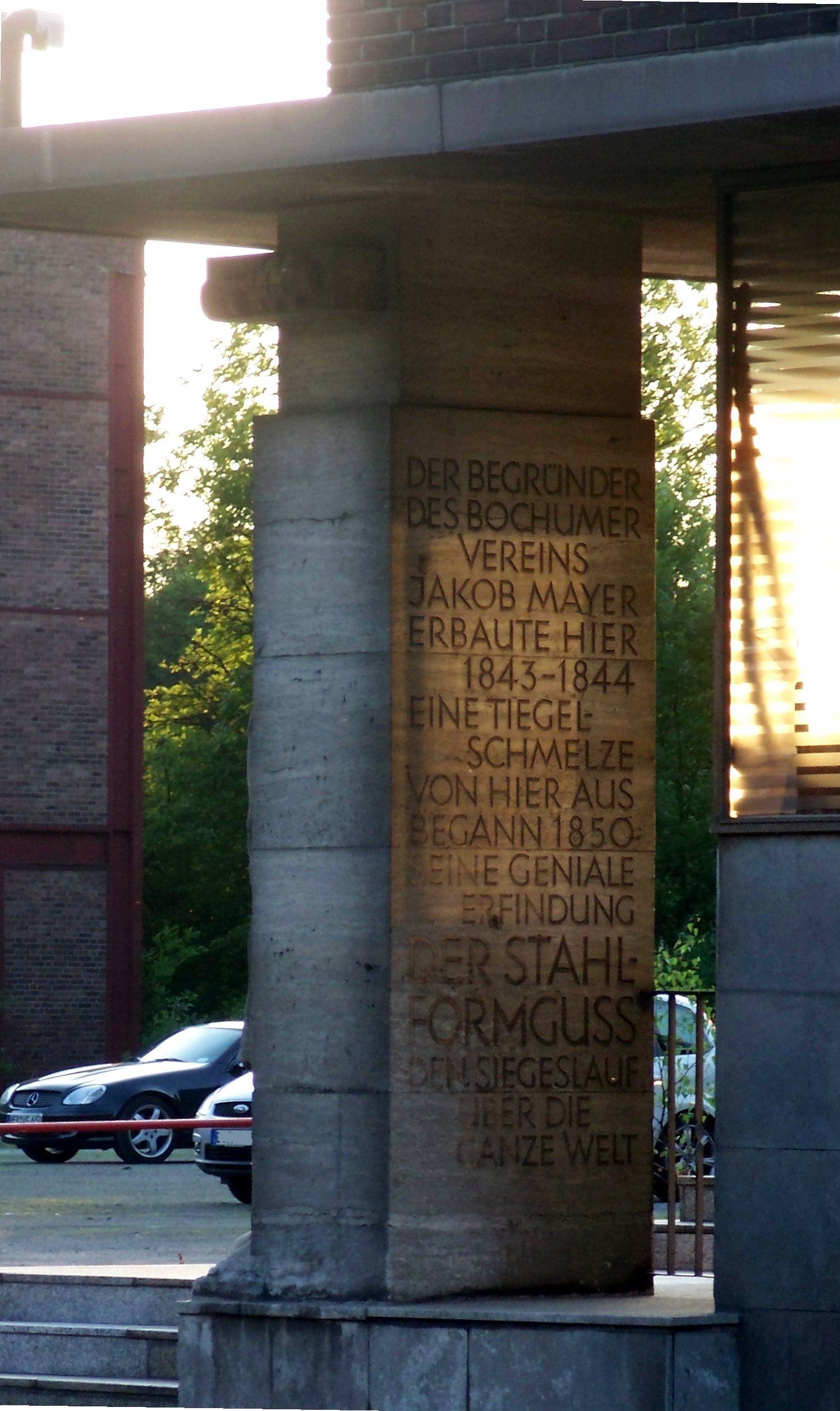 Gedenksäule an die Erfindung des Stahlformgusses durch Jacob Mayer unweit Tor 1 des Bochumer Vereins an der Alleestraße, Eingang der ehemaligen Abnahmezentrale, 1935 errichtet. Auf der anderen Seite der Säule befindet sich eine Plastik des "Stahlformgießers" des Bildhauers Willy Meller als "Soldat der Arbeit". Quelle: Broschüre zum Tag des offenen Denkmals in Bochum, 13. November 1998. Die "Jacob Mayer Säule" wurde am 31.05.2007 unter der Nr. A 625 in die Denkmalliste der Stadt Bochum eingetragen [1].